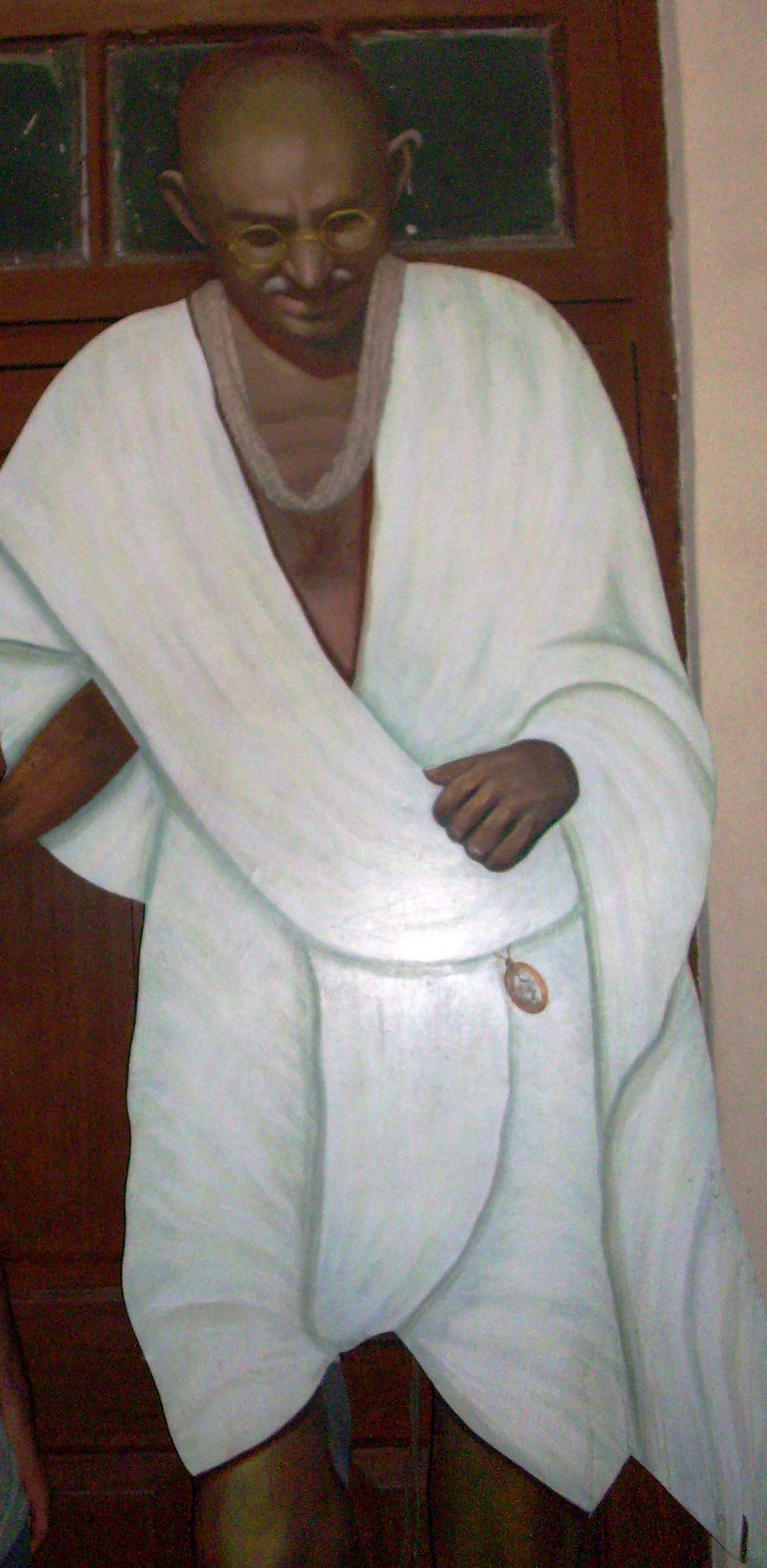 تمثال مهاتما غاندي